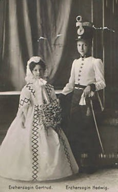 Es handelt sich bei den Mädchen um Töchter der Kaisertochter Marie Valerie aus ihrer Ehe mit Erzherzog Franz Salvator für ein Festspiel in Kostümen